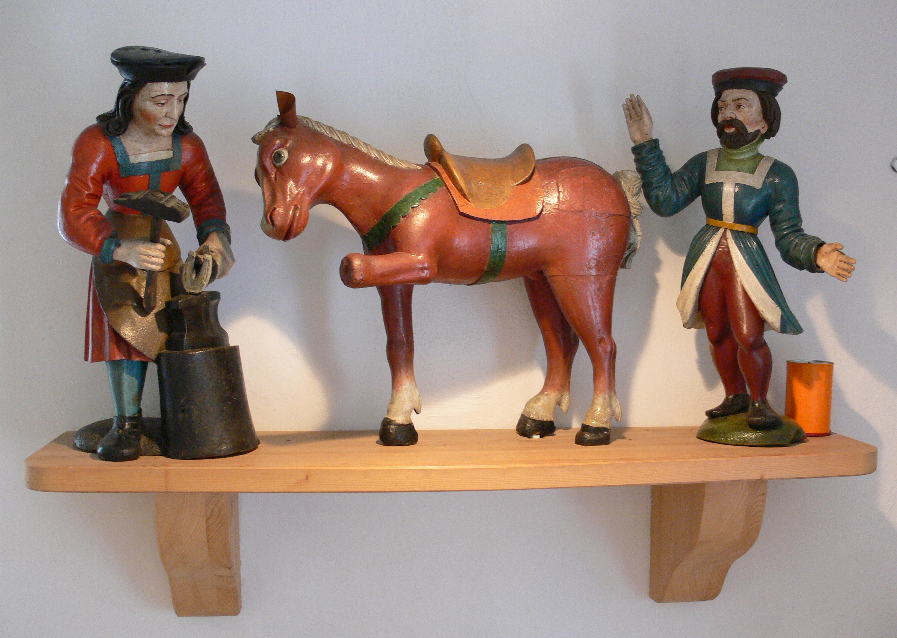 Kapelle Abetsweiler, Gemeinde Bergatreute, Landkreis Ravensburg Eligiusgruppe